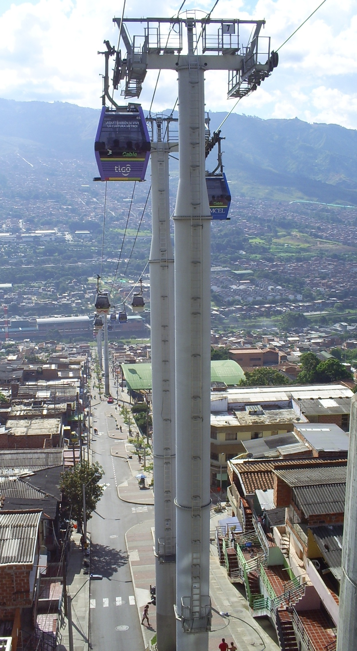 Metro de Medellín, Línea K, Medellín, Colombia